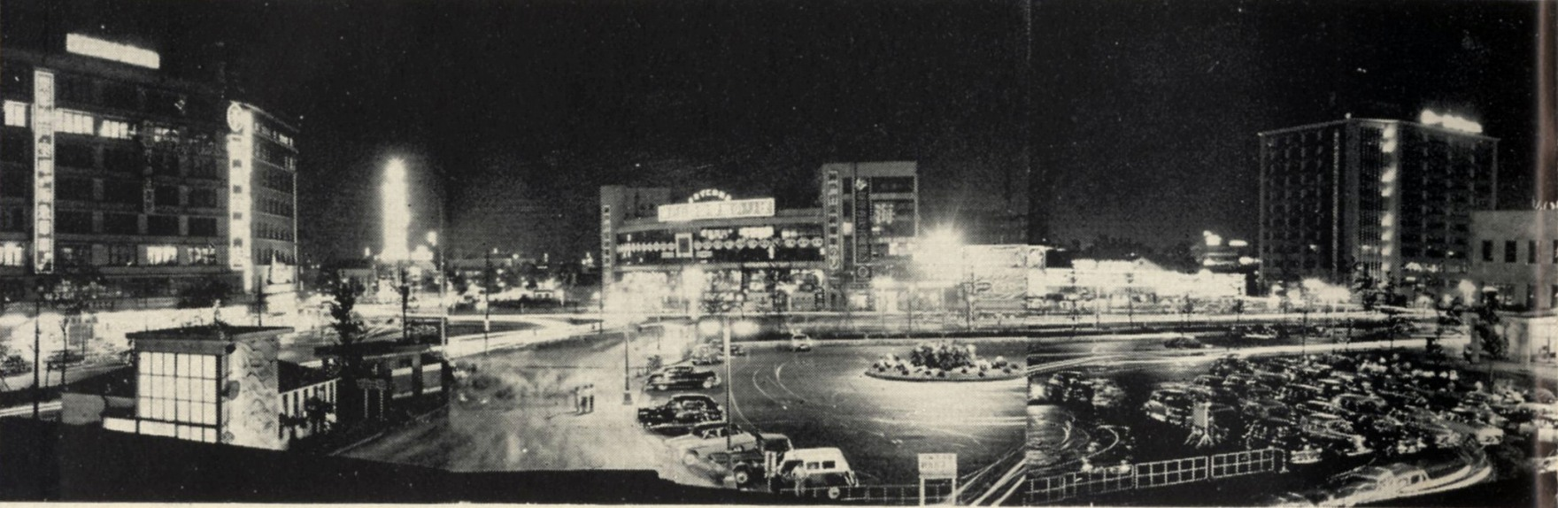 大阪駅城東線ホームからの撮影と思われる。阪急百貨店、阪神百貨店、第一生命ビル、右端に大阪駅の駅舎が見える。